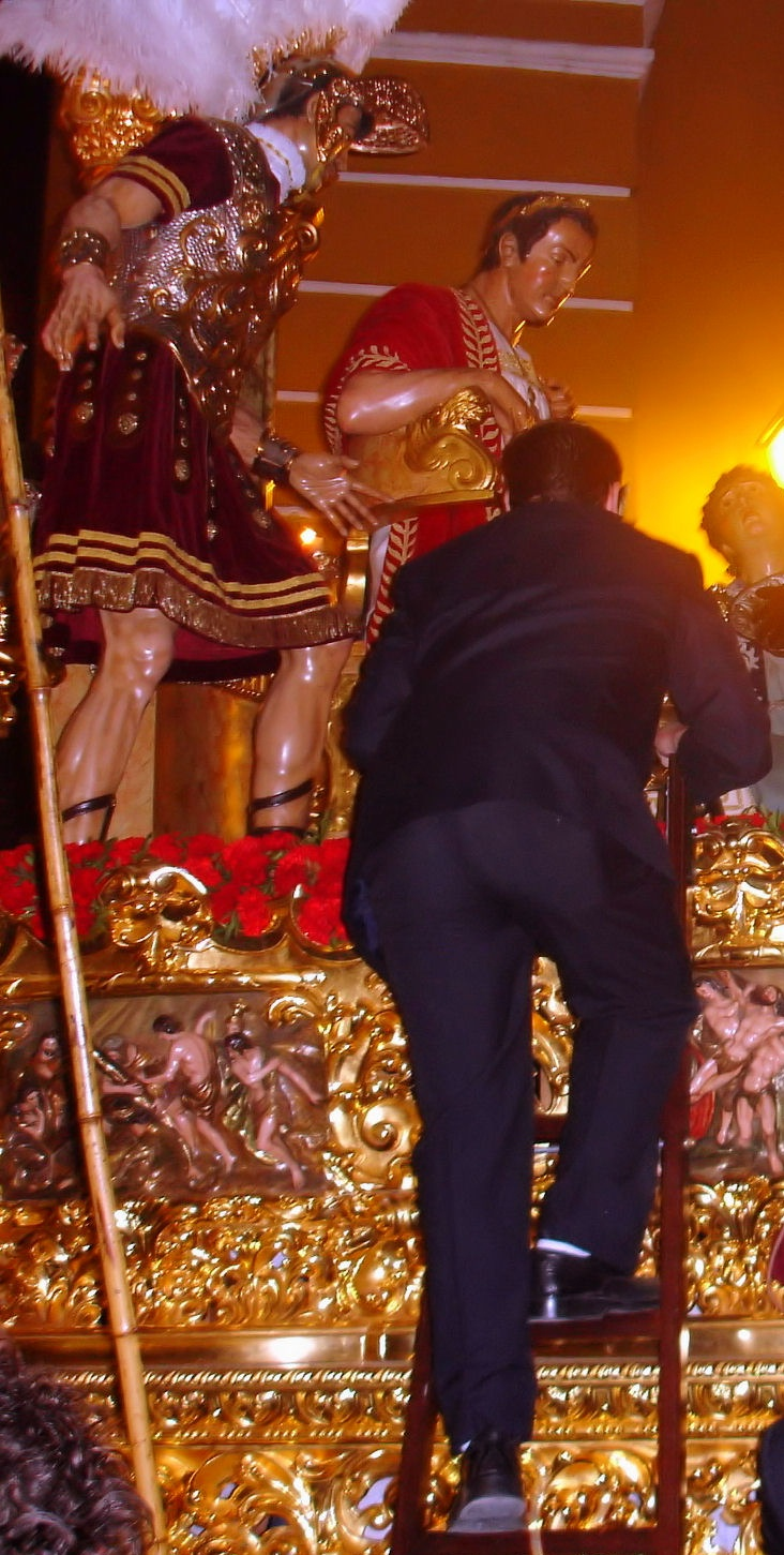 Semana Santa in Sevilla. Vervanging van de wierook op de paso.